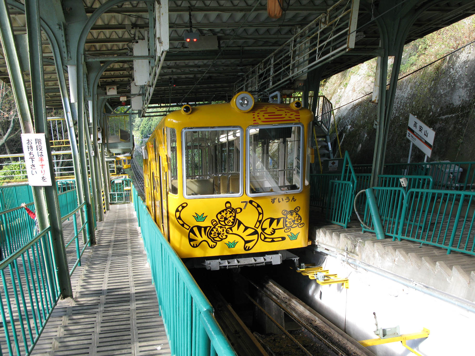 近鉄高安山駅ケーブルカー乗場 2007年11月撮影。 機材：PowerShot G7 撮影者：Kansai explorer 撮影後リサイズ